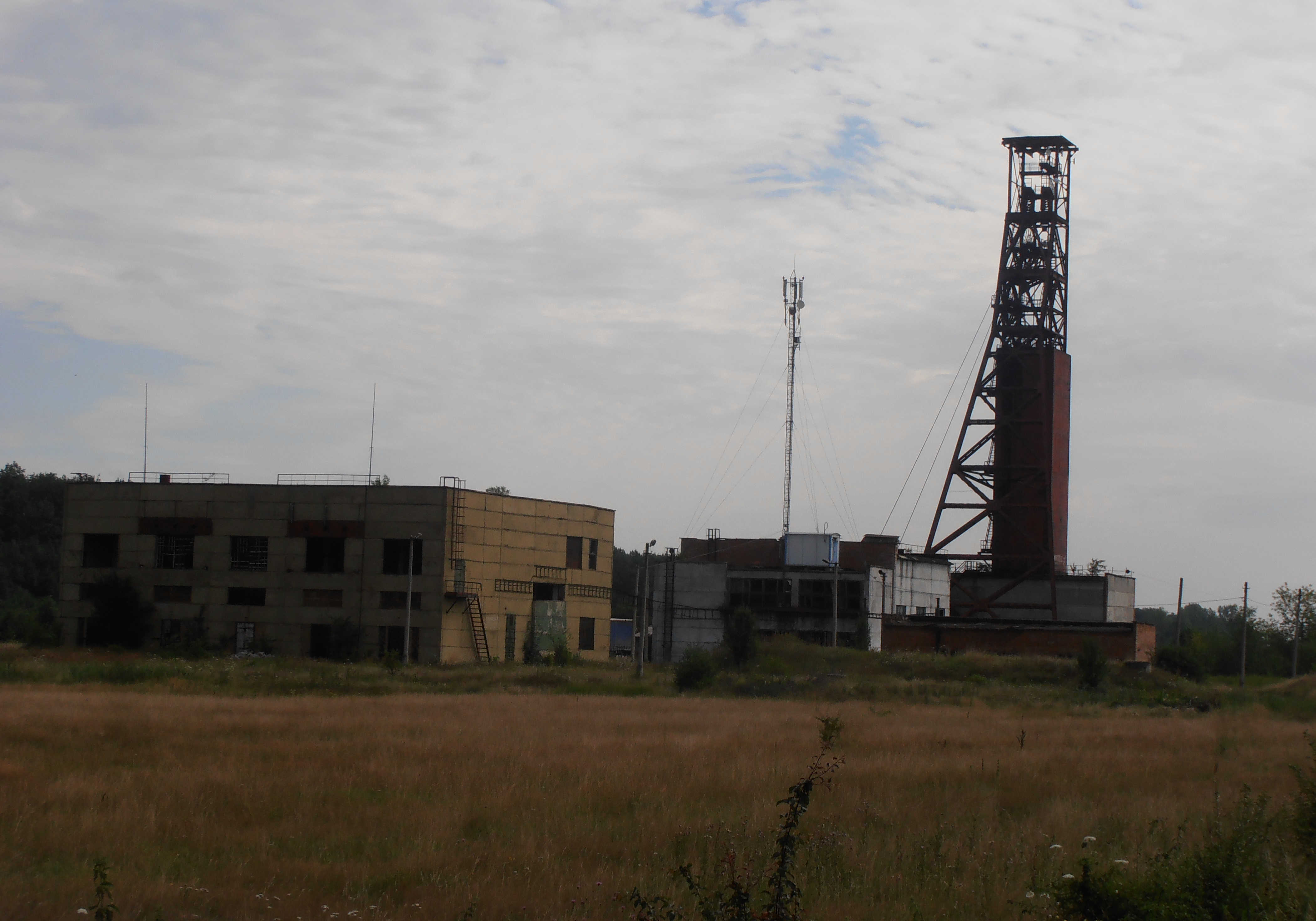 Недобудована шахта